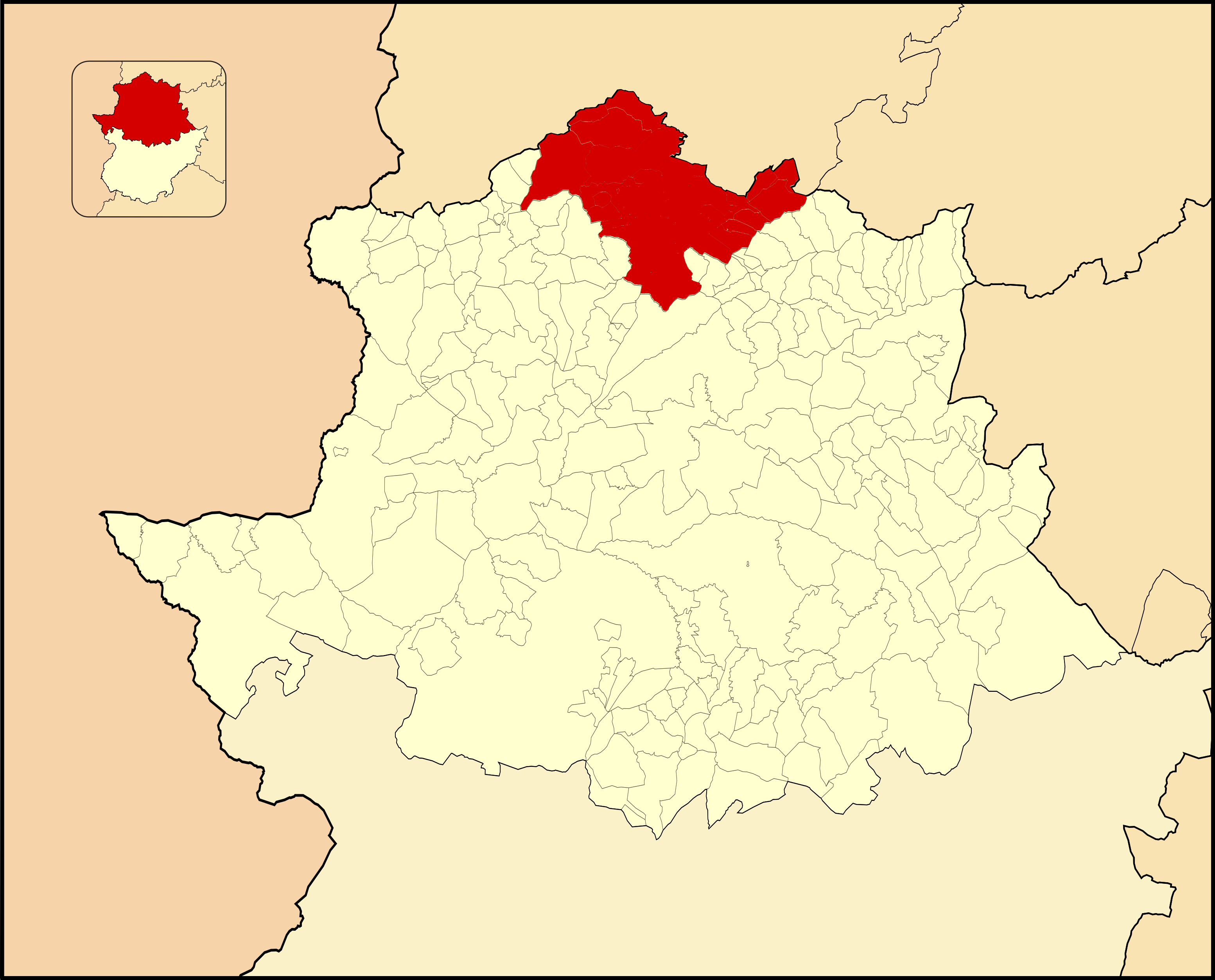 Situación de la comarca de Hervás